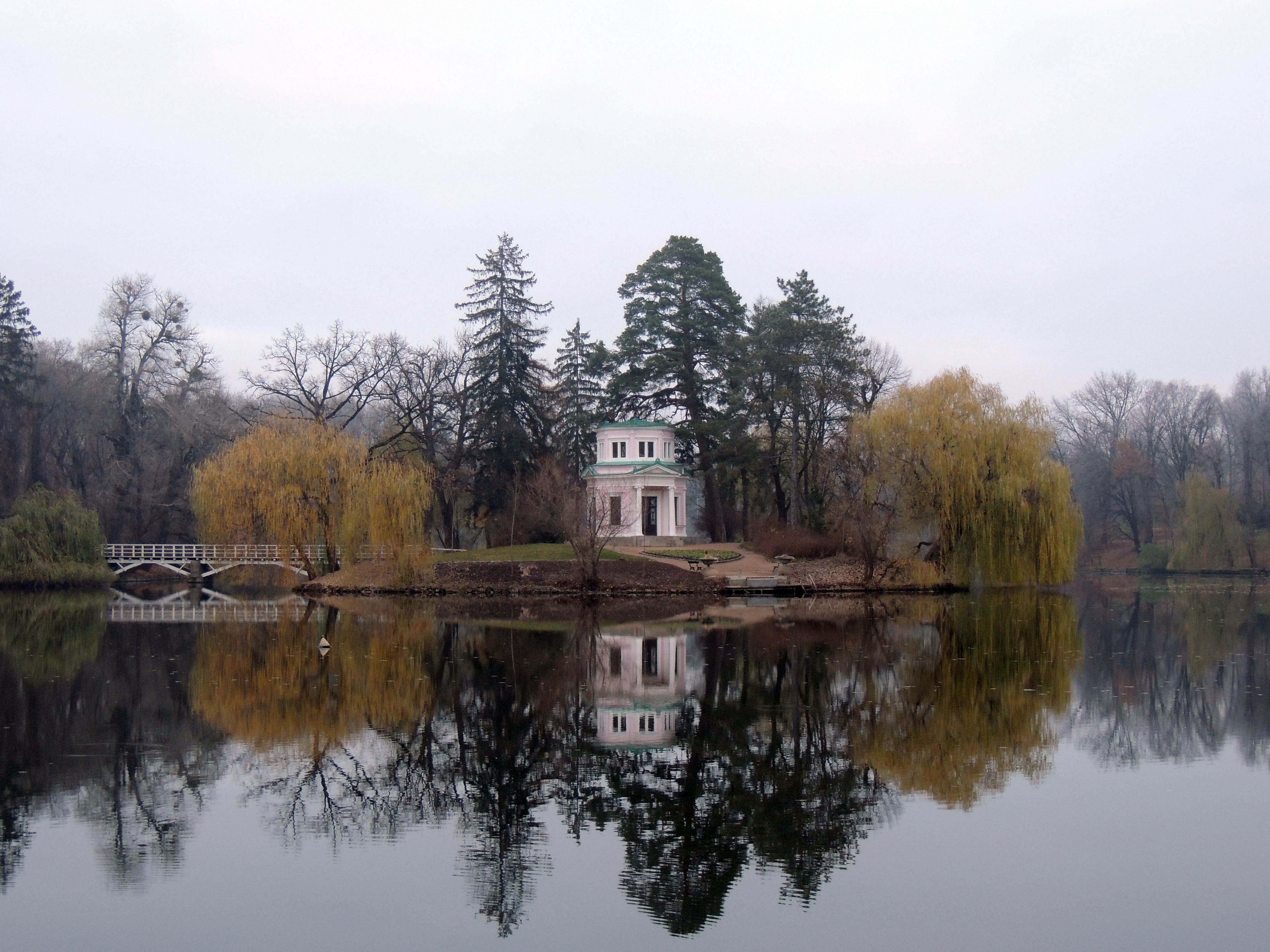 «Софіївка», Уманський район, м. Умань